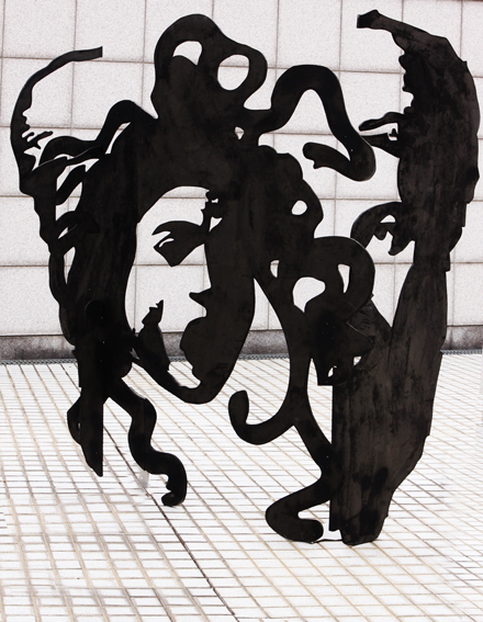 ‘Medusa Touch’, Fe.McWilliam Gallery, Bambridge, UK